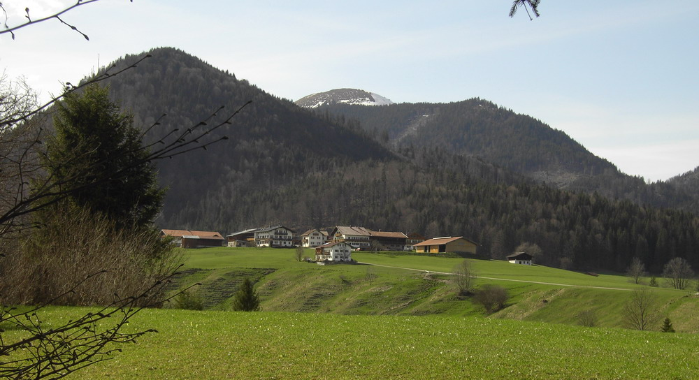 Ortsteil Berg von Jachenau